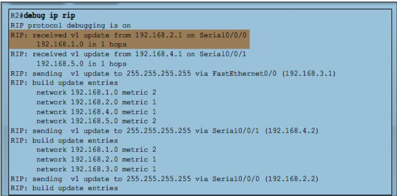 Монгол: j